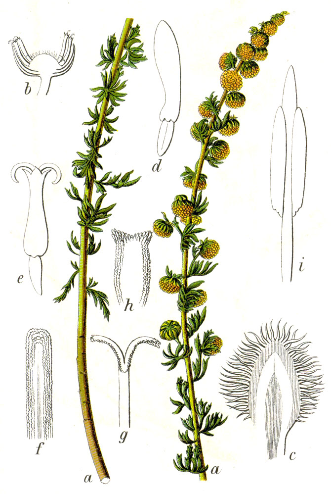 Artemisia rupestris L. Original Caption Sibirischer Wermut, Artemisia rupestris